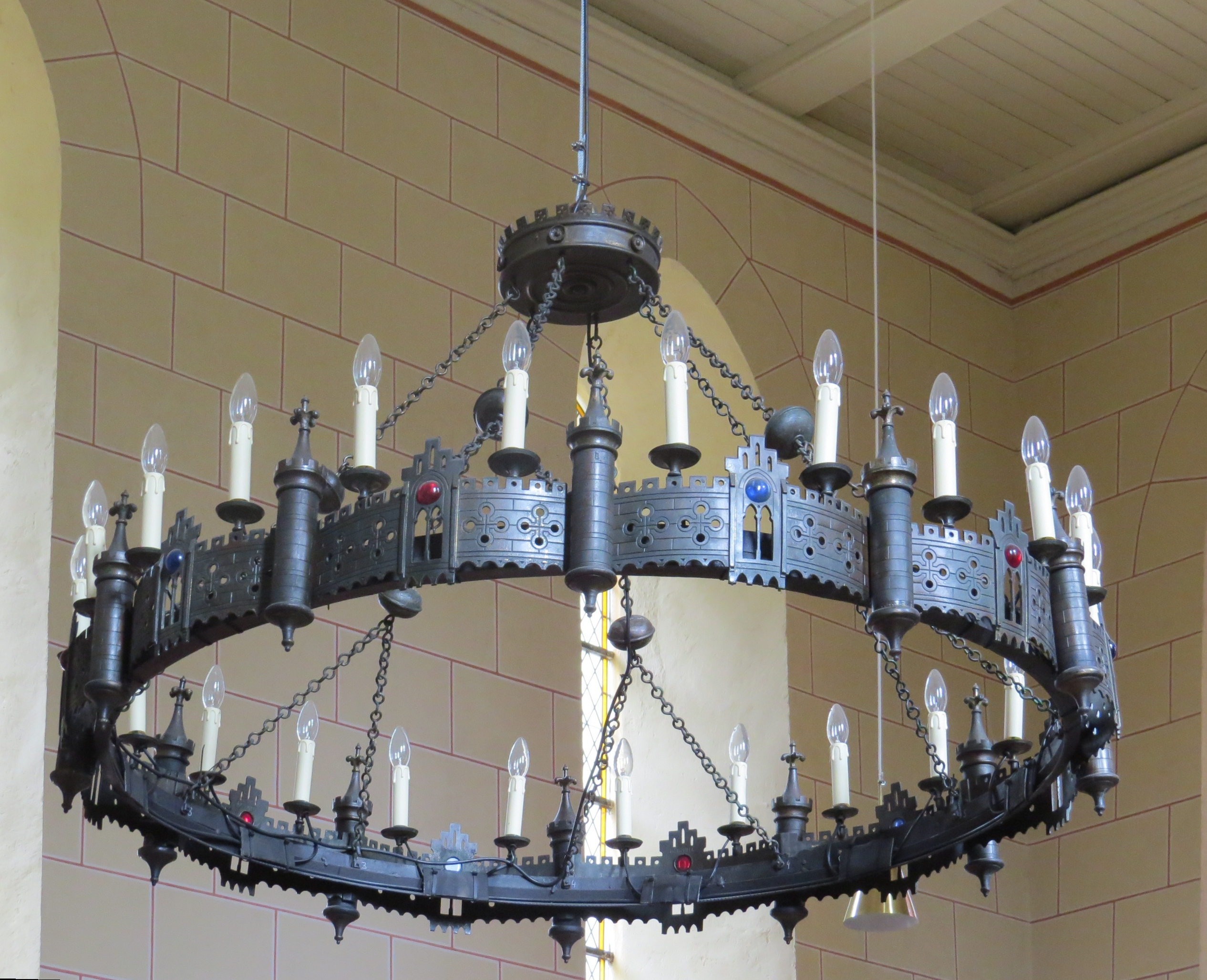 Inneres der ev. Kirche St. Johannes zu Lychen: Kronleuchter